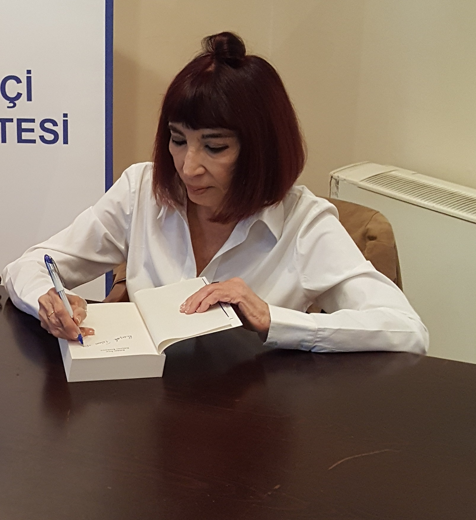 Gülriz Sururi, kitap imzalarken. Kasım 2016.